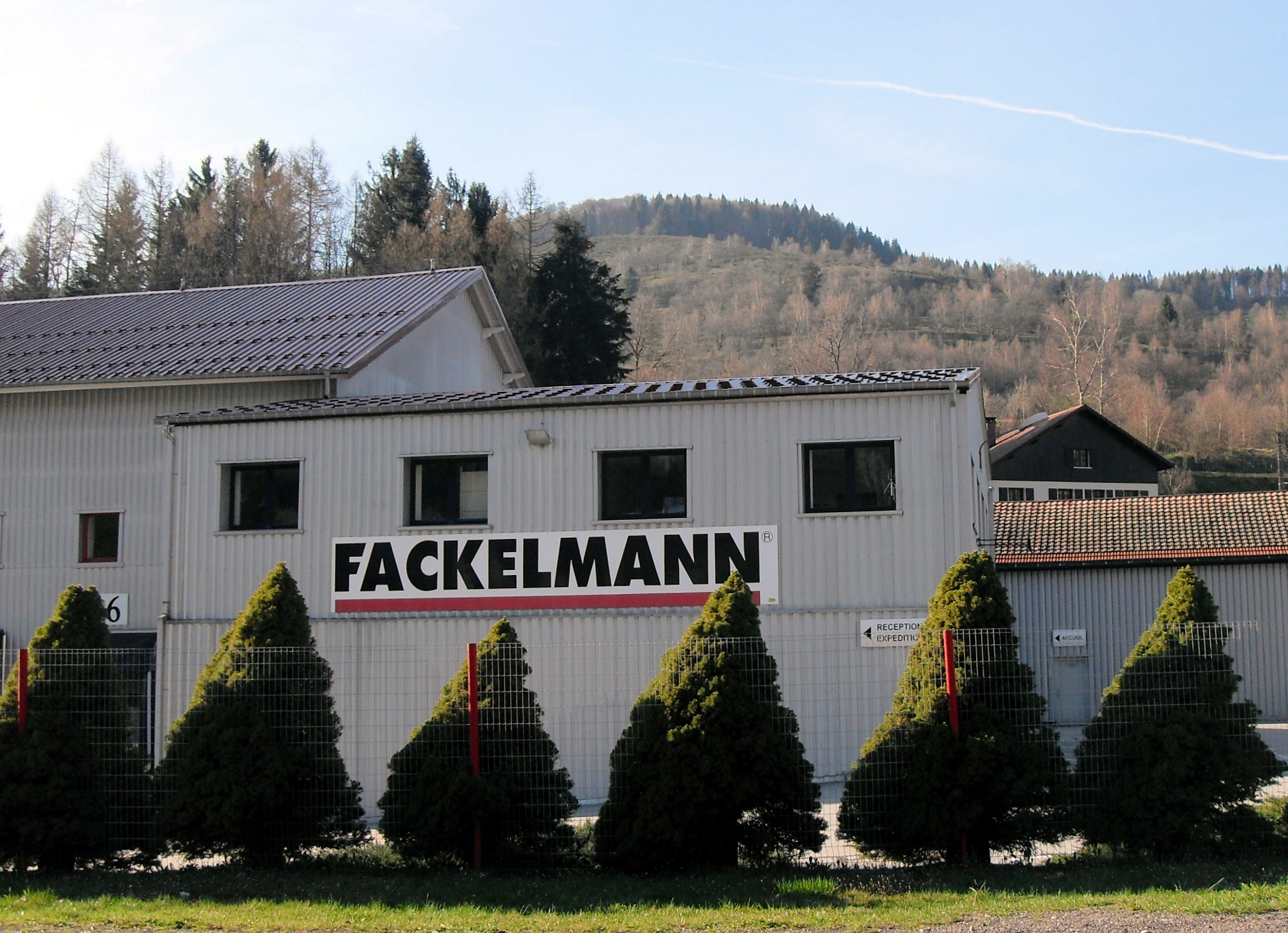 Les fabricants Accueil des appareils Fackelmann à Bussang